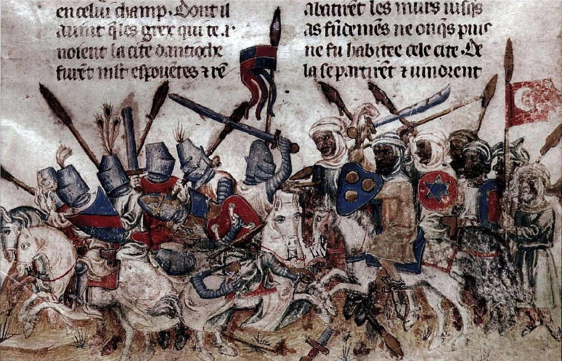 ÖNB, Cod. 2623, f.15r:Unten Miniatur: Reiterschlacht zwischen Sarazenen und Griechen unter dem oströmischen Kaiser Eracles (Heraklius, 610-641) bei Antiochia im Jahre 632, in der die Griechen in die Flucht getrieben werden. Die Griechen tragen Kübelhelme, Kettenpanzer und Waffenhemden, mit Wappen bemalte Tartschen, die Pferde Schabracken wie in Miniaturen zu französischen Ritterromanen des XIII. und XIV. Jahrhunderts, die Sarazenen orientalische Tracht mit Turbanen.